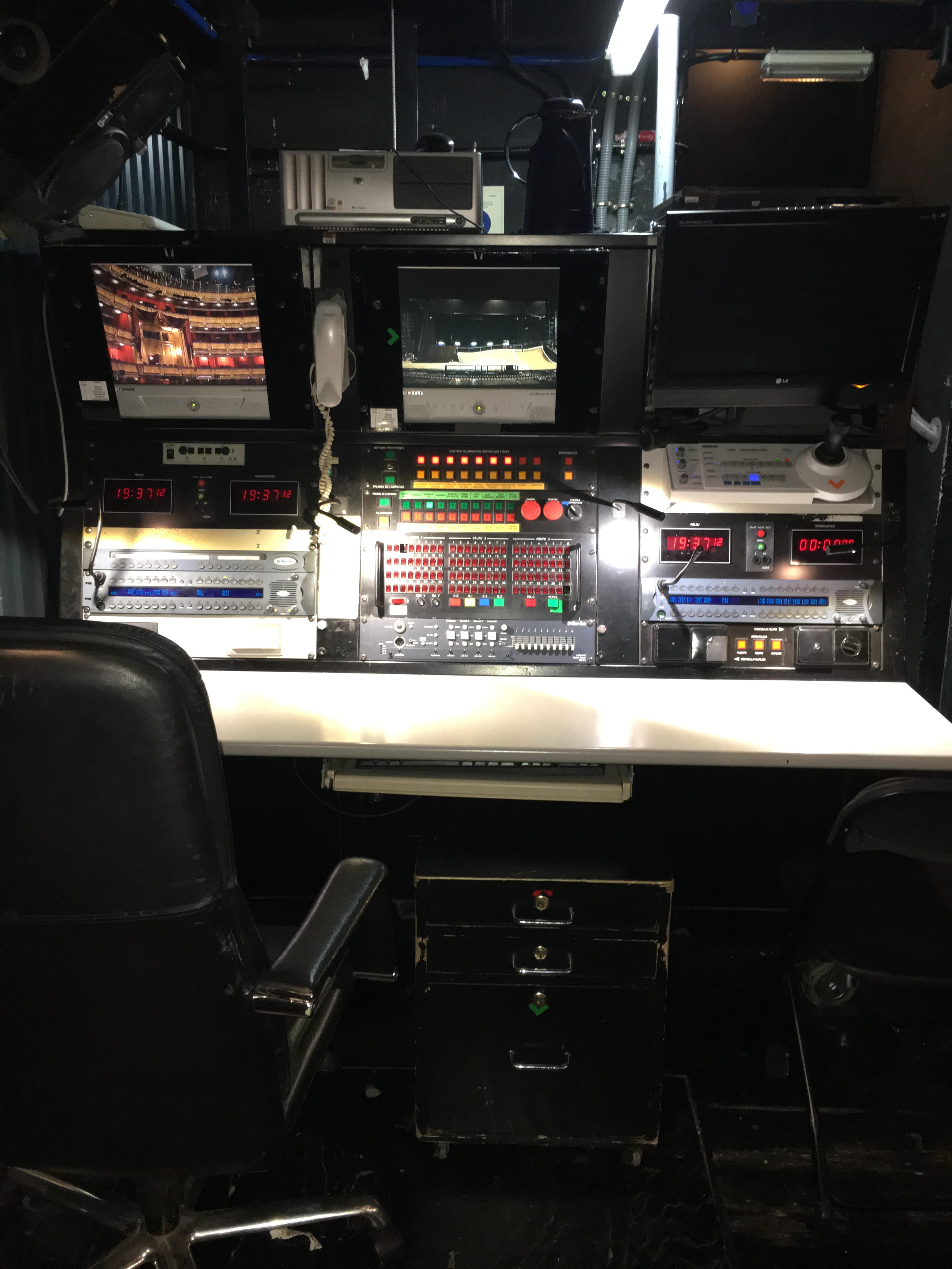 Este es el pupitre de regiduría del Teatro Real de Madrid